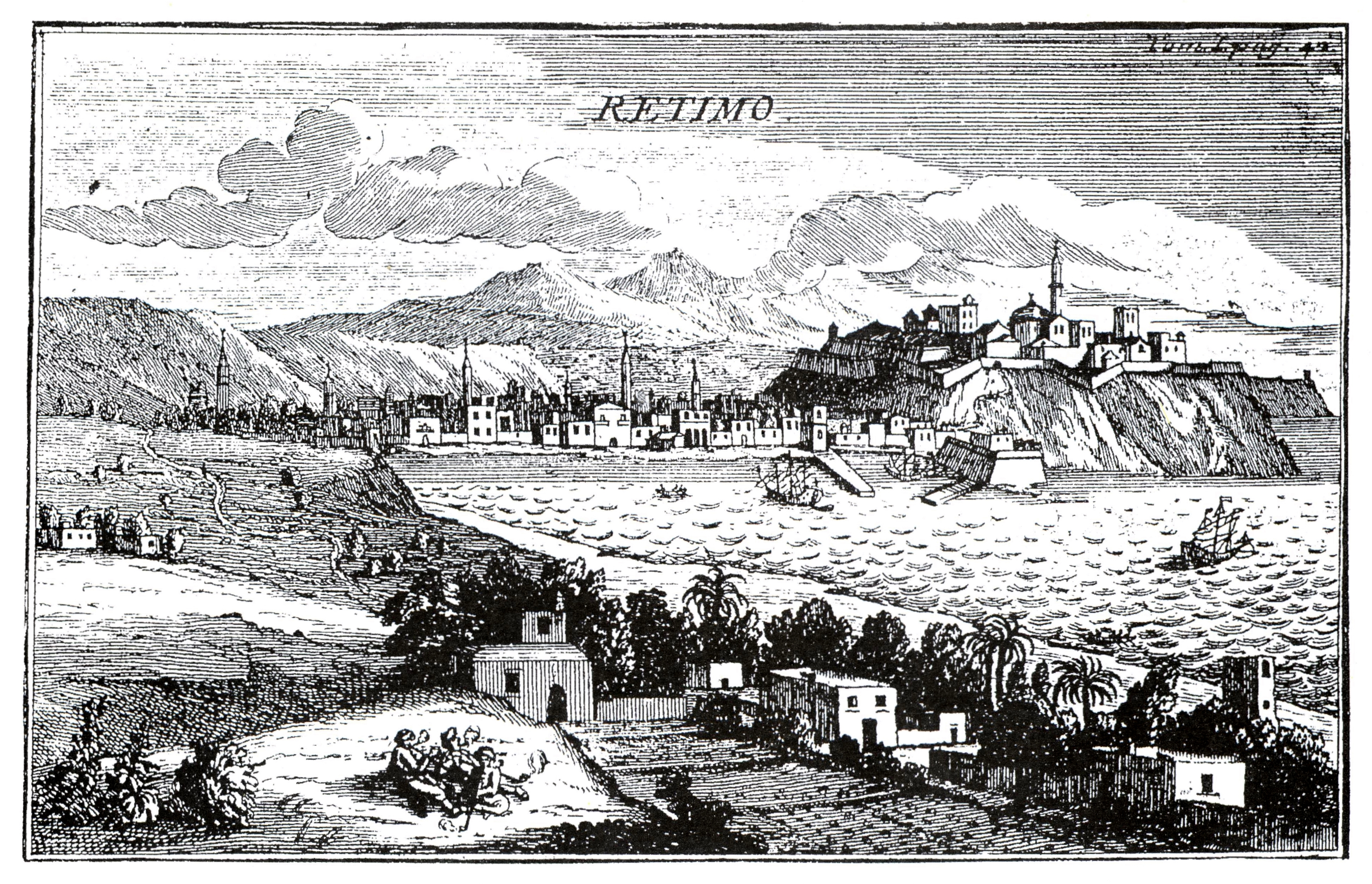 Retimo (Rethymno), Zeichnung vom März 1700, Kreta